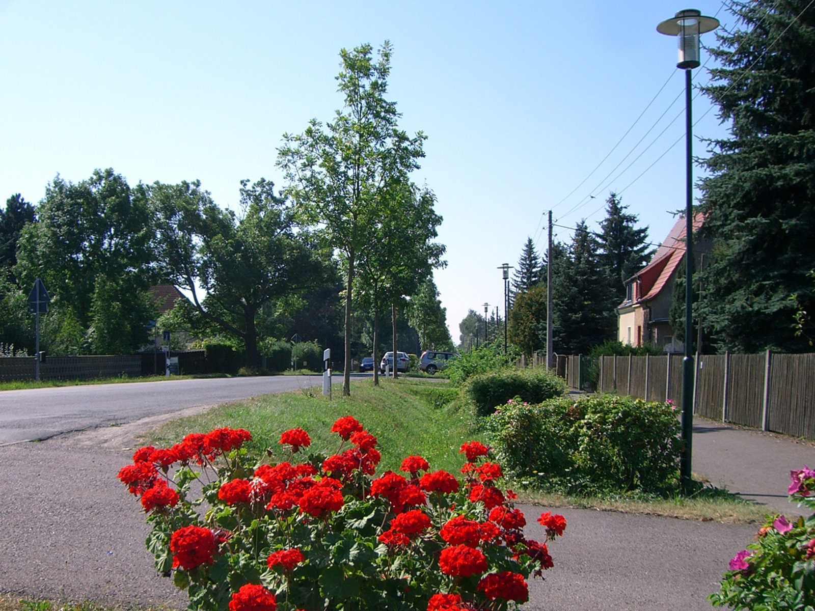 Die Siedlung Auenhain, Teil der Stadt Markkleeberg